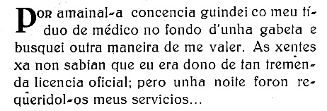 "O retrato"